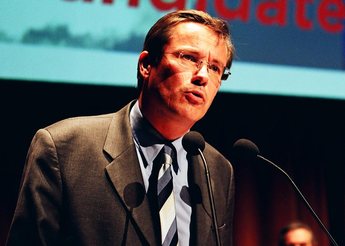 Nicolas Dupont-Aignan au meeting de Debout la République à Paris